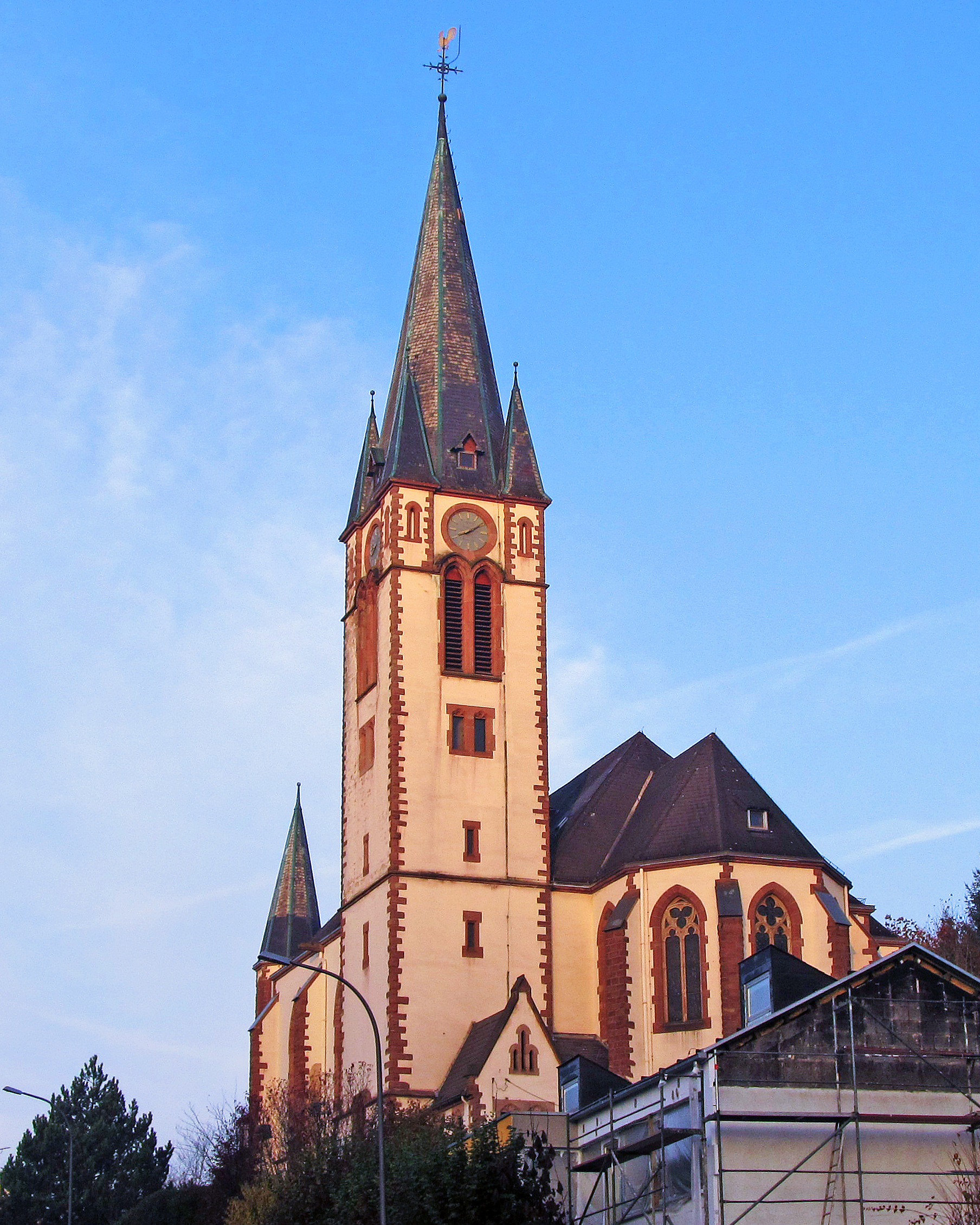 Die katholische Pfarrkirche Mariä Himmelfahrt in Geislautern, einem Stadtteil von Völklingen, Saarland